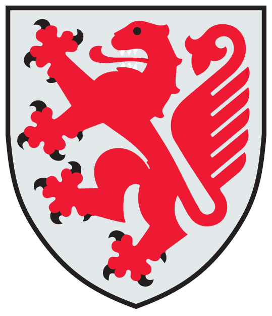 Offizielles Wappen der Stadt Braunschweig „Die Stadt führt als Wappen im silbernen Schilde einen steigenden links (heraldisch rechts) gewendeten roten Löwen mit weißen Zähnen, roter Zunge und schwarzen Krallen. Die Schildbreite verhält sich zur Schildhöhe 6:7. Für die heraldische Gestaltung des Wappens ist der Wappenbrief vom 15. Oktober 1438 maßgebend.“ (Hauptsatzung der Stadt Braunschweig)